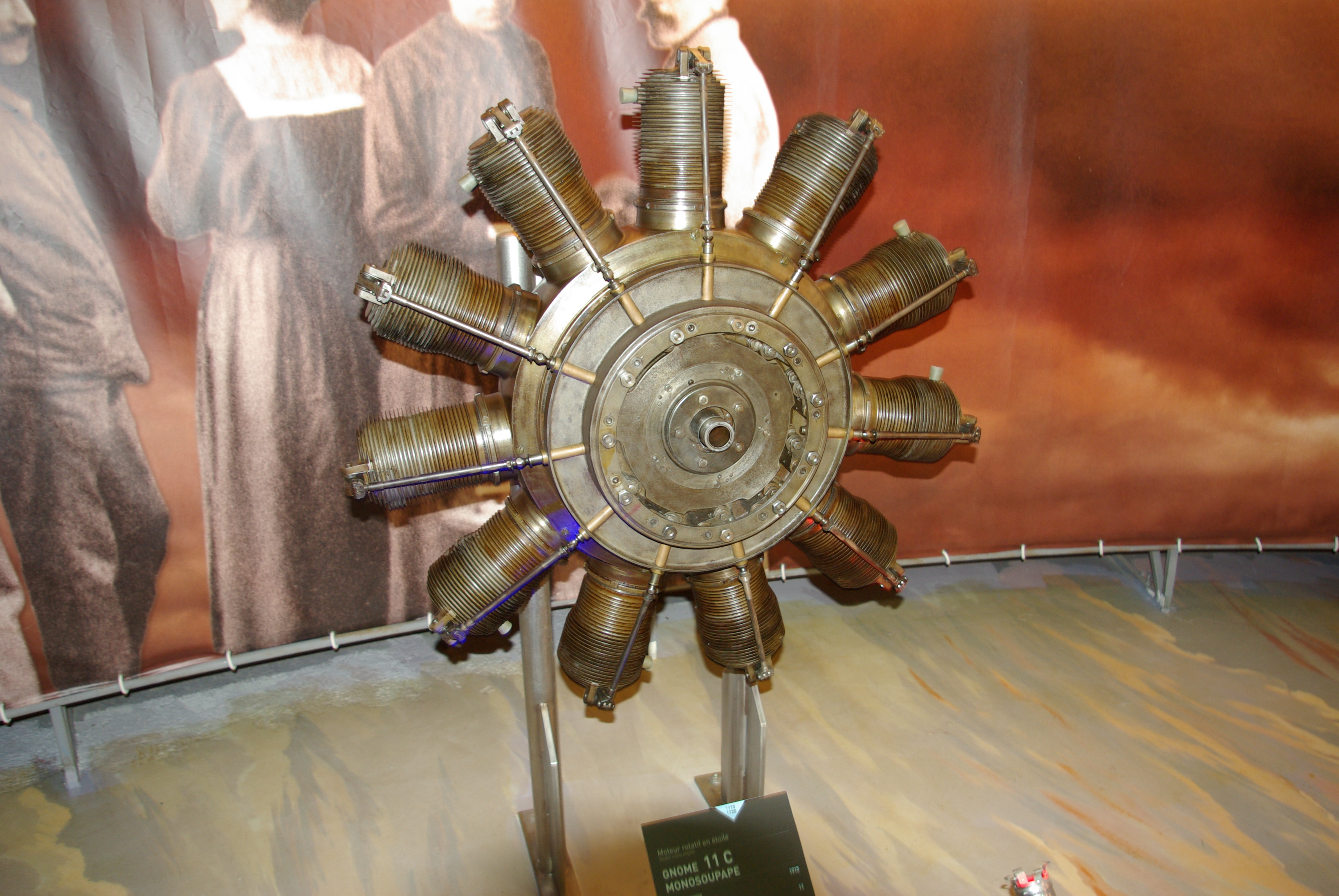 Gnome 11C Monosoupape présenté au Musée Safran.